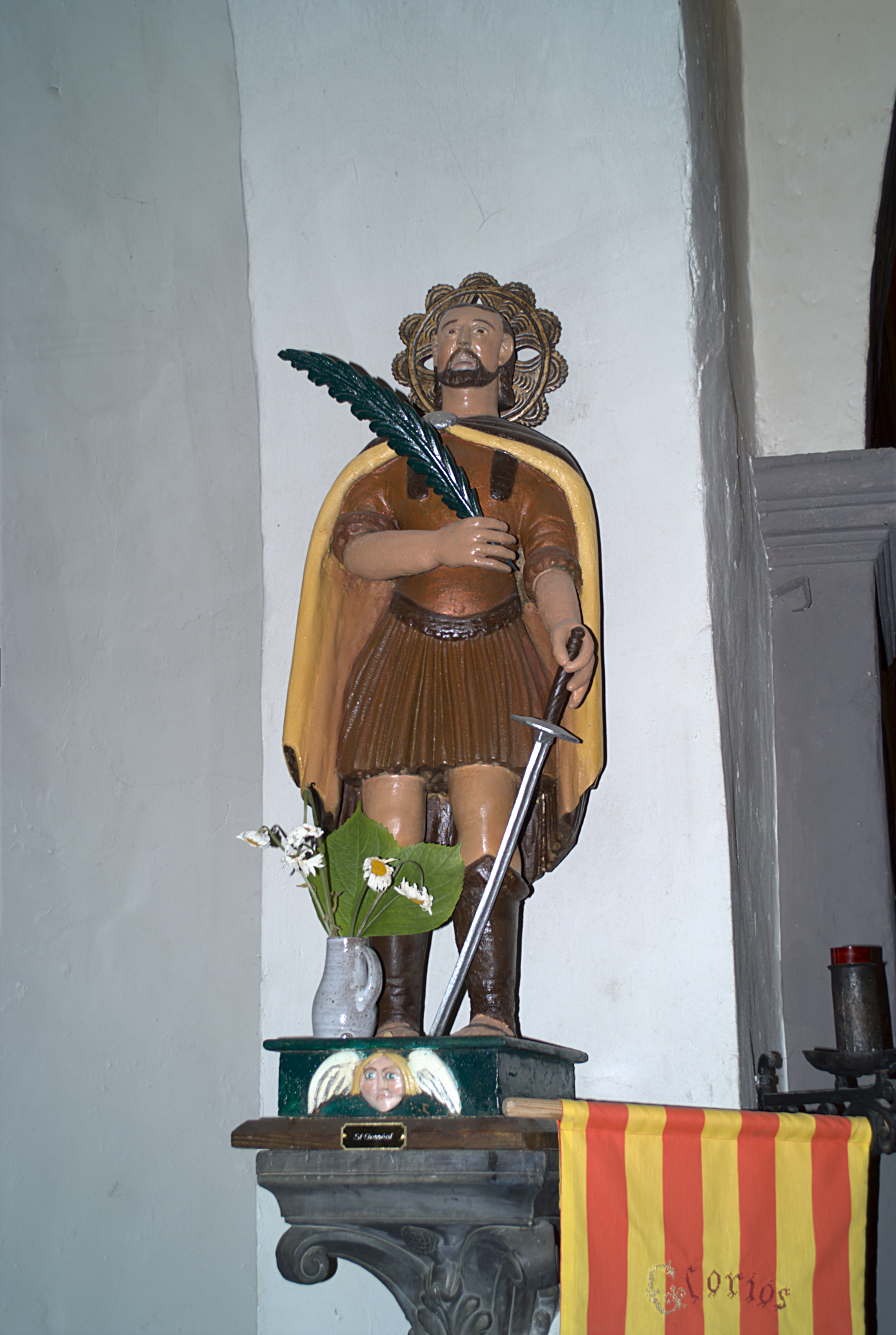 Statue de Saint-Ferréol à la croisée du transept, ermitage Saint-Ferreol, Céret (Pyrénées-Orientales, Languedoc-Roussillon, France)